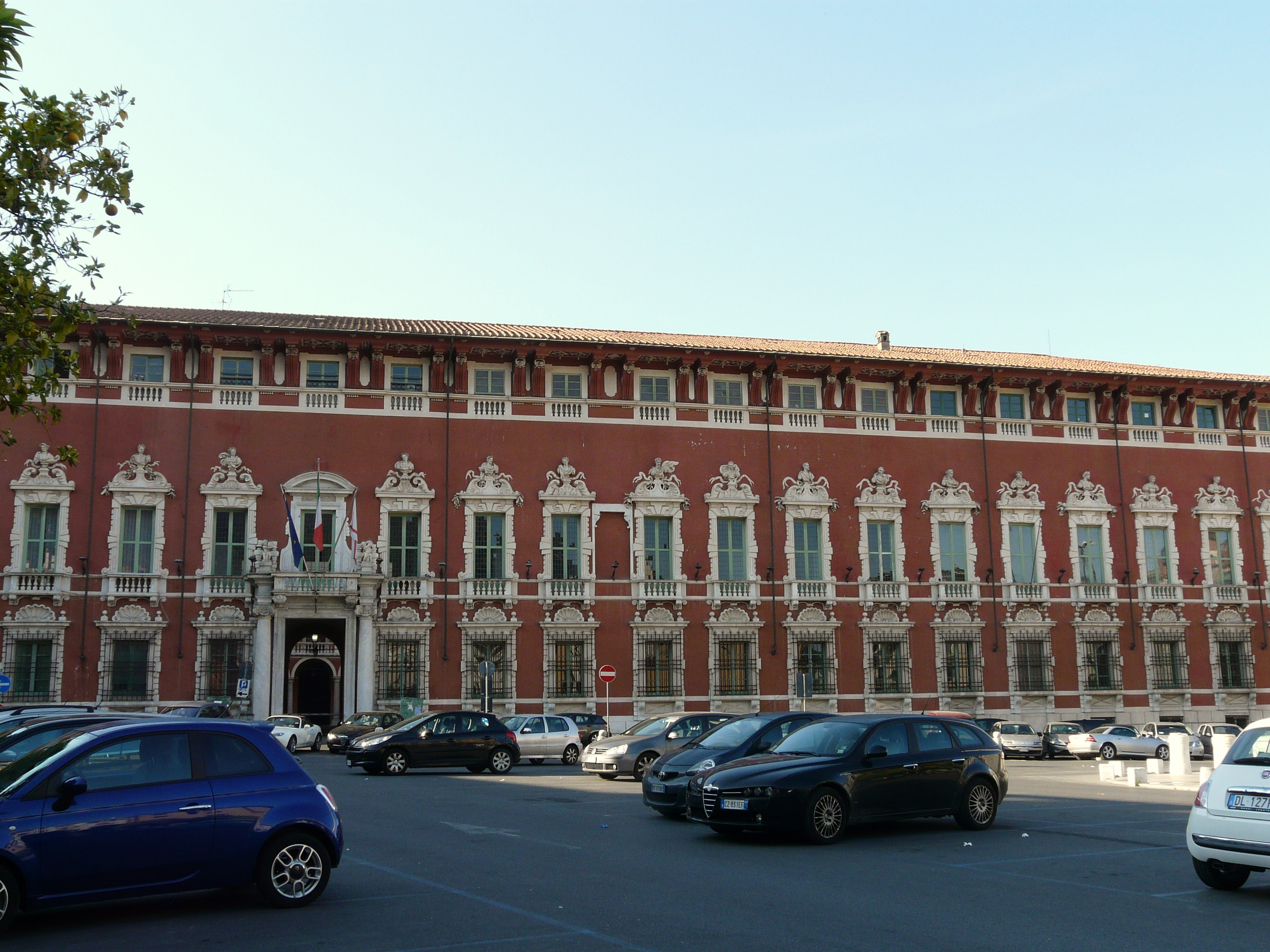 Palazzo Ducale di Massa, Toscana, Italia